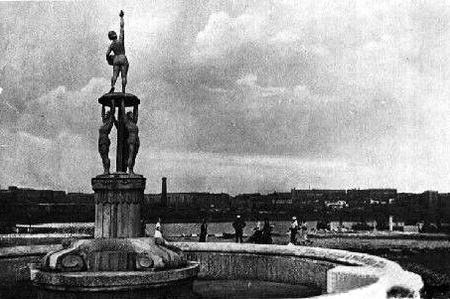 1938. Фонтан в парке Постышева